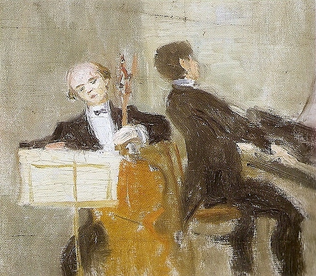 Catalan: Pau Casals i Enric Granadostitle QS:P1476,ca:"Pau Casals i Enric Granados" label QS:Lca,"Pau Casals i Enric Granados"